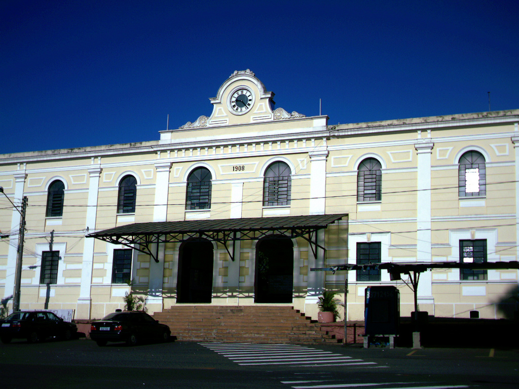 Estação ferroviária de São Carlos. Inaugurada definitivamente em 1912, fazia parte da então Cia. Paulista de Estradas de Ferro.....